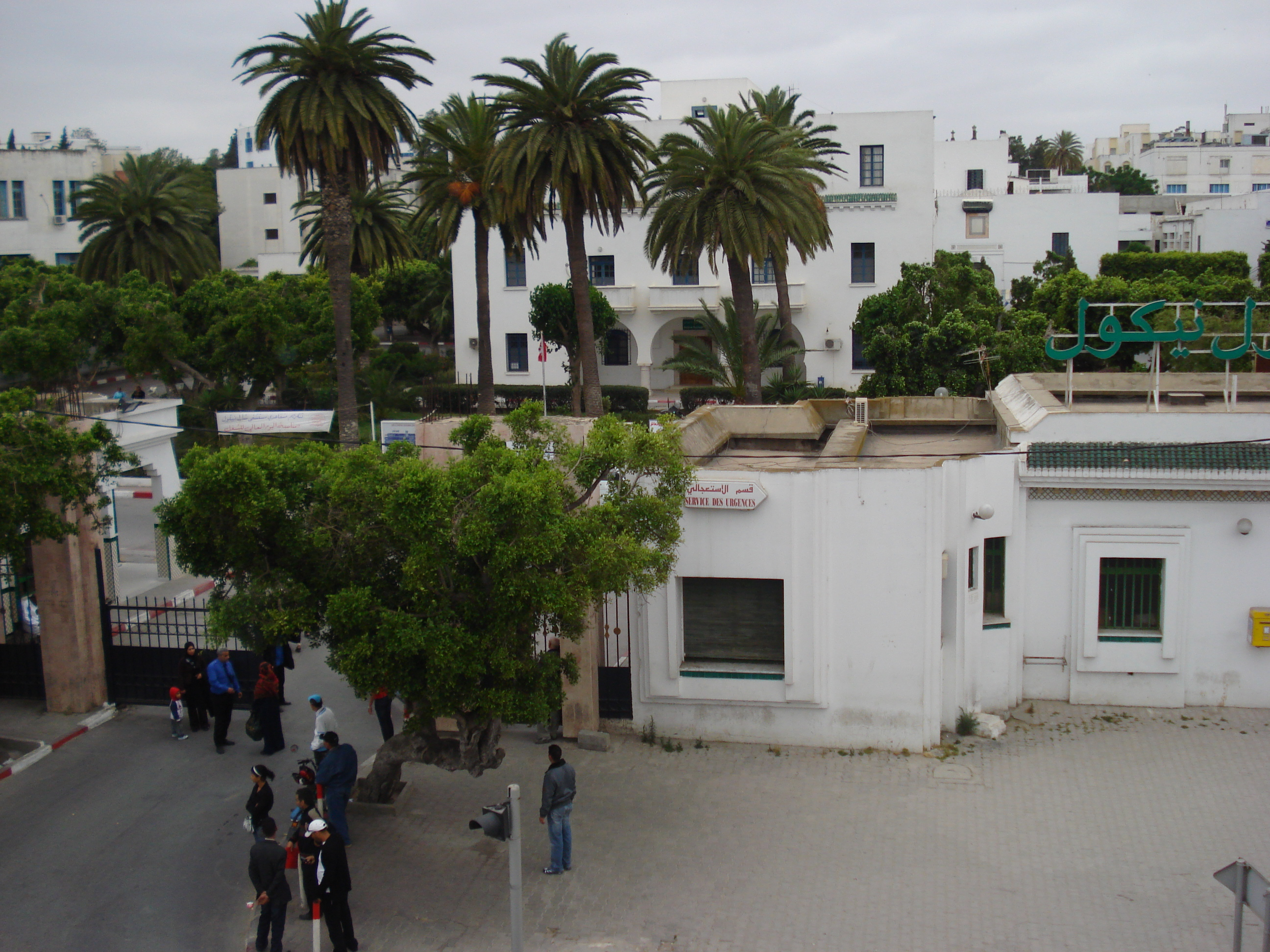 Entrée de l'hôpital Charles Nicolle, Tunis, Tunisie